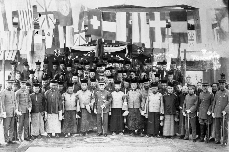 Монгол: 1919 оны намар Хятадын генерал Сю Шүжан Монголын автономитыг унагах үед Бодоо нь Консулын дэнжийн нууц бүлгэмийг үүсгэн байгуулжээ.